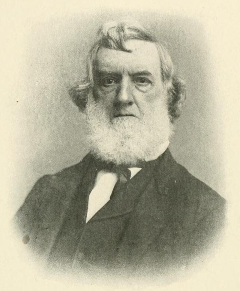 p53